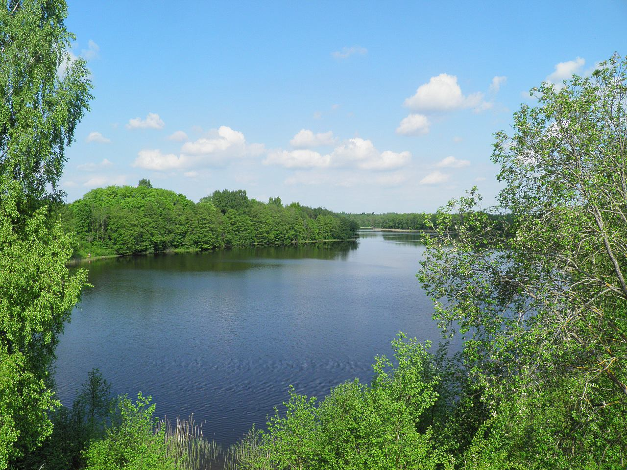 Āzišķu ezers Ilūkstes novada Prodes pagastā